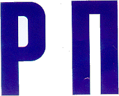 Симболот на Работничка партија